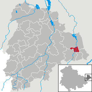 Frohnsdorf in Thuringia - District Altenburger Land